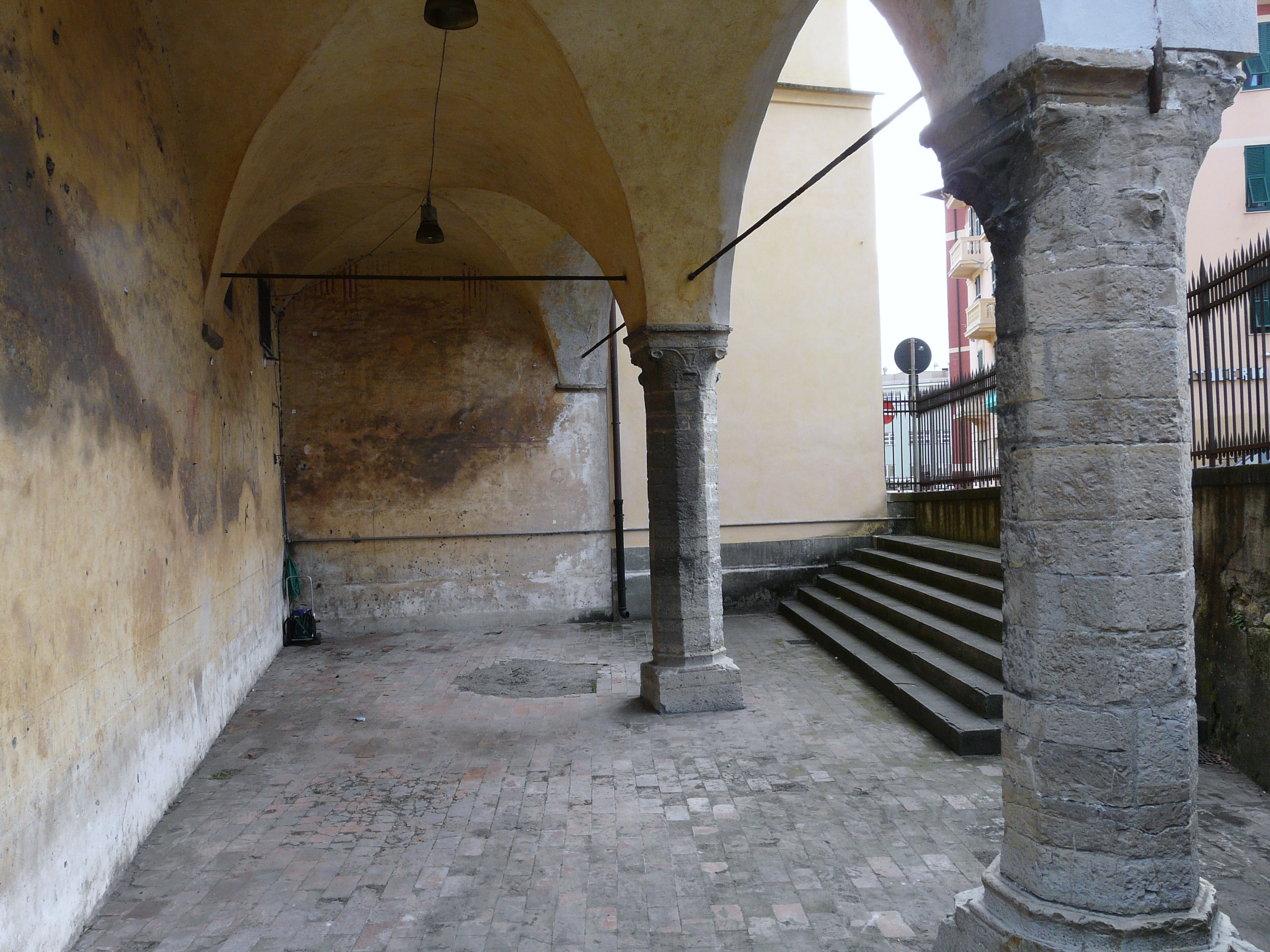 Chiostro esterno della chiesa di San Gerolamo, Quarto dei Mille, Genova, Liguria, Italia